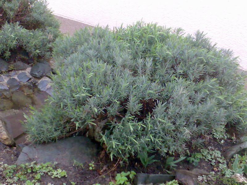 Lavanda